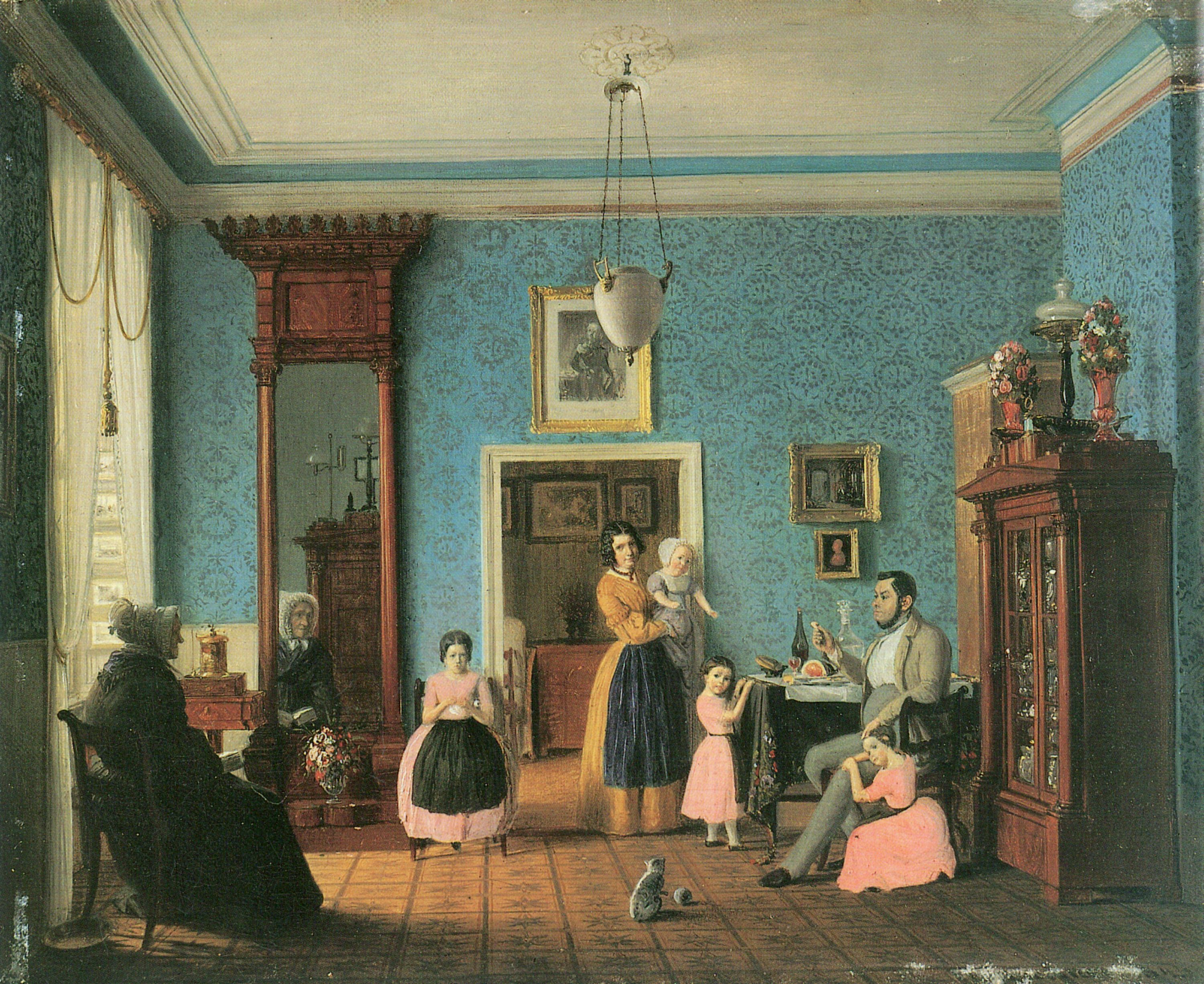 Комната в квартире слесаря Ц.Ф.А. Хаусшильд в Берлине, Штралауер штрассе 49